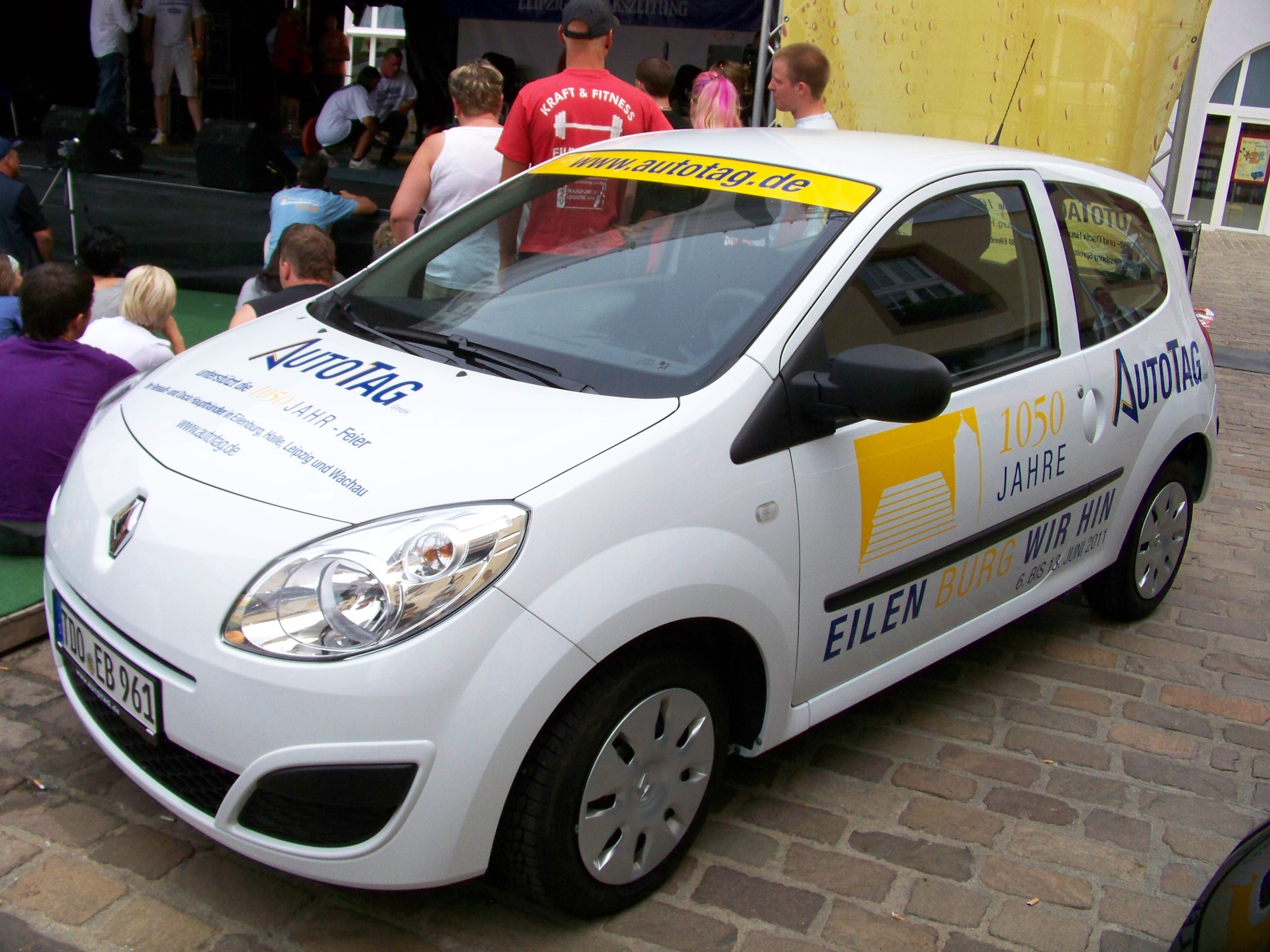 Im Rahmen der 1050-Jahrfeier gab es eine Losaktion, bei der der Hauptpreis dieser Renault Twingo war, der die Wochen zuvor bereits an verschiedenen Orten im Stadtgebiet ausgestellt wurde.